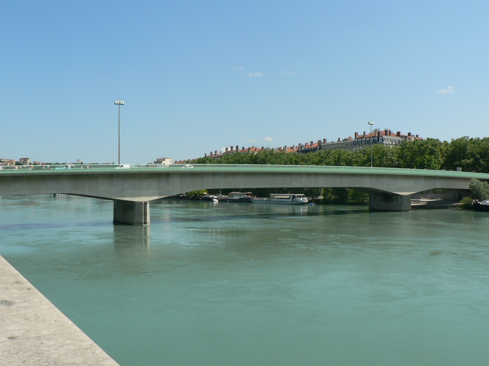 Ponts de Lyon – Pont Morand